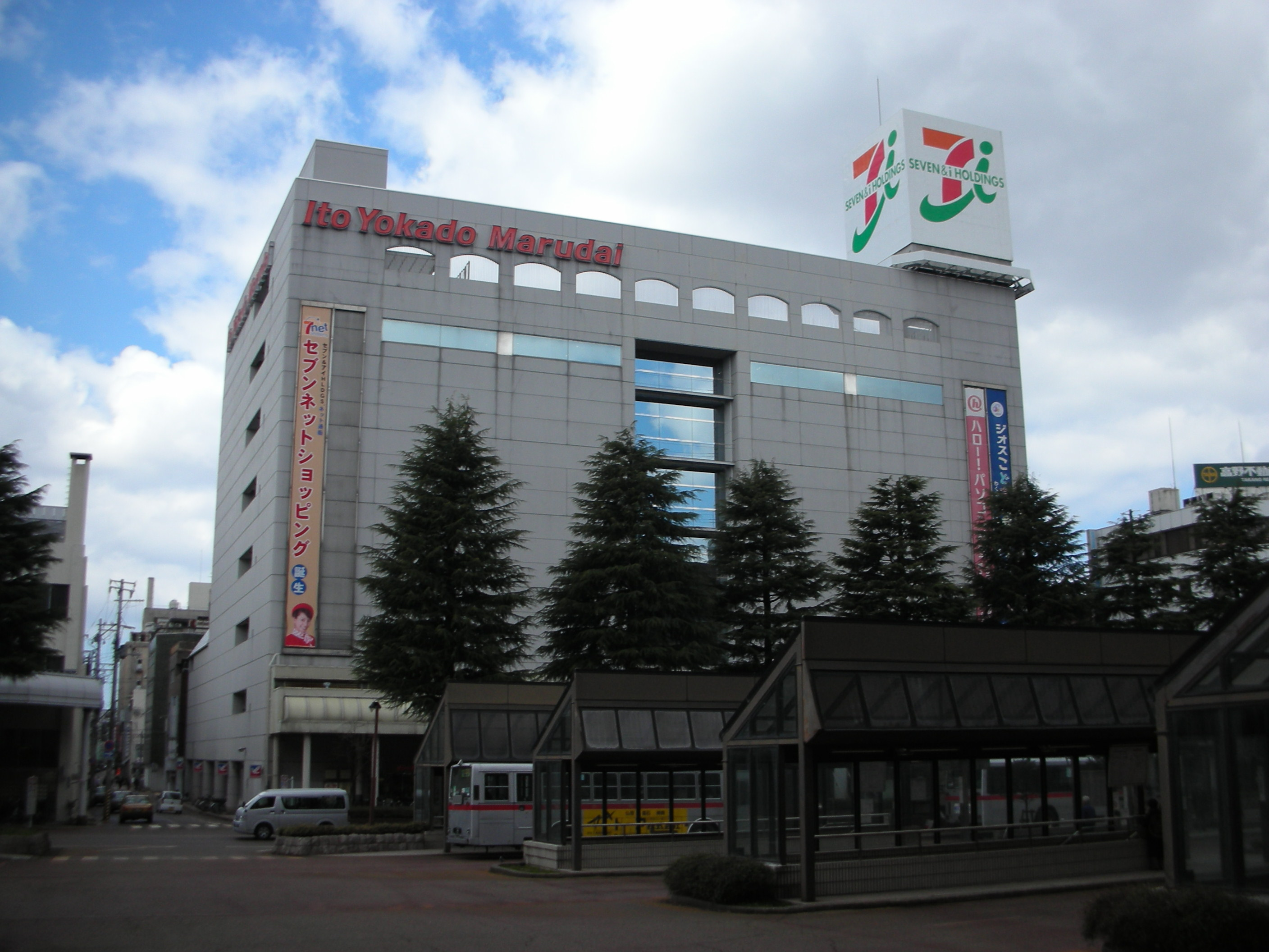 イトーヨーカドー丸大長岡店の外観